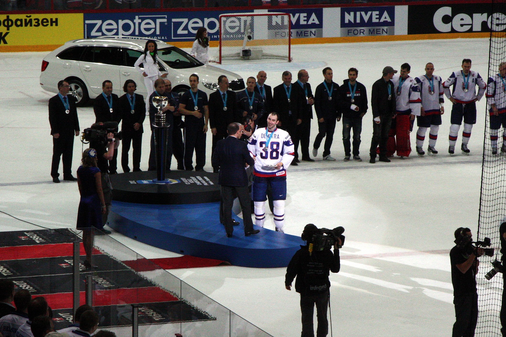 Чемпионат мира по хоккею 2012. Награждение сборной Словакии по хоккею серебряными медалями. Капитан сборной Словакии Здено Хара в майке Павола Демитры. 20.05.2012